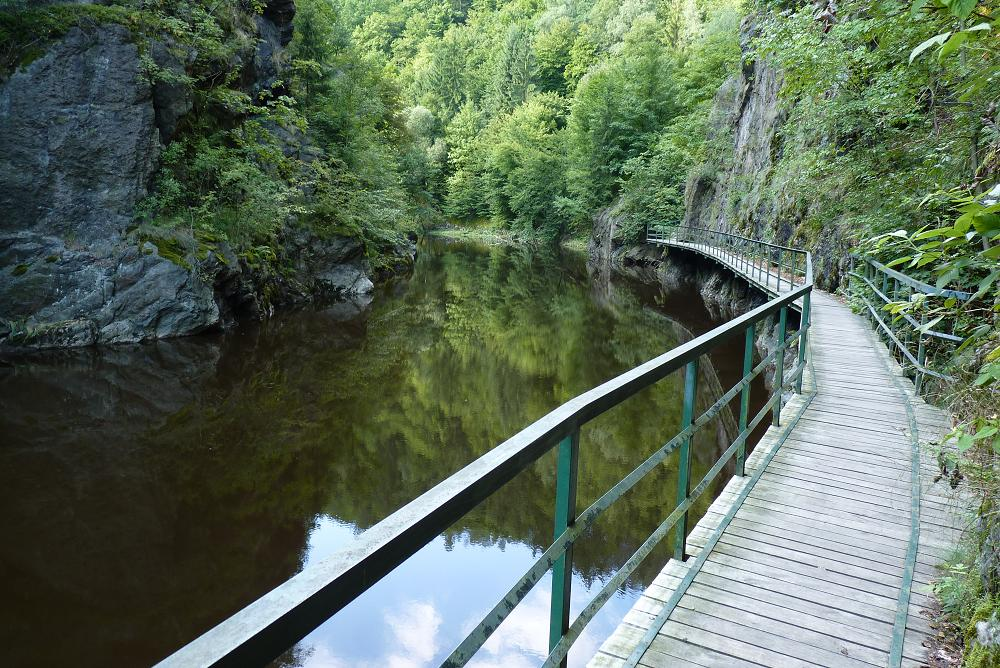 Lávka nad Jizerou na Riegrově stezce mezi Semily a Železným Brodem